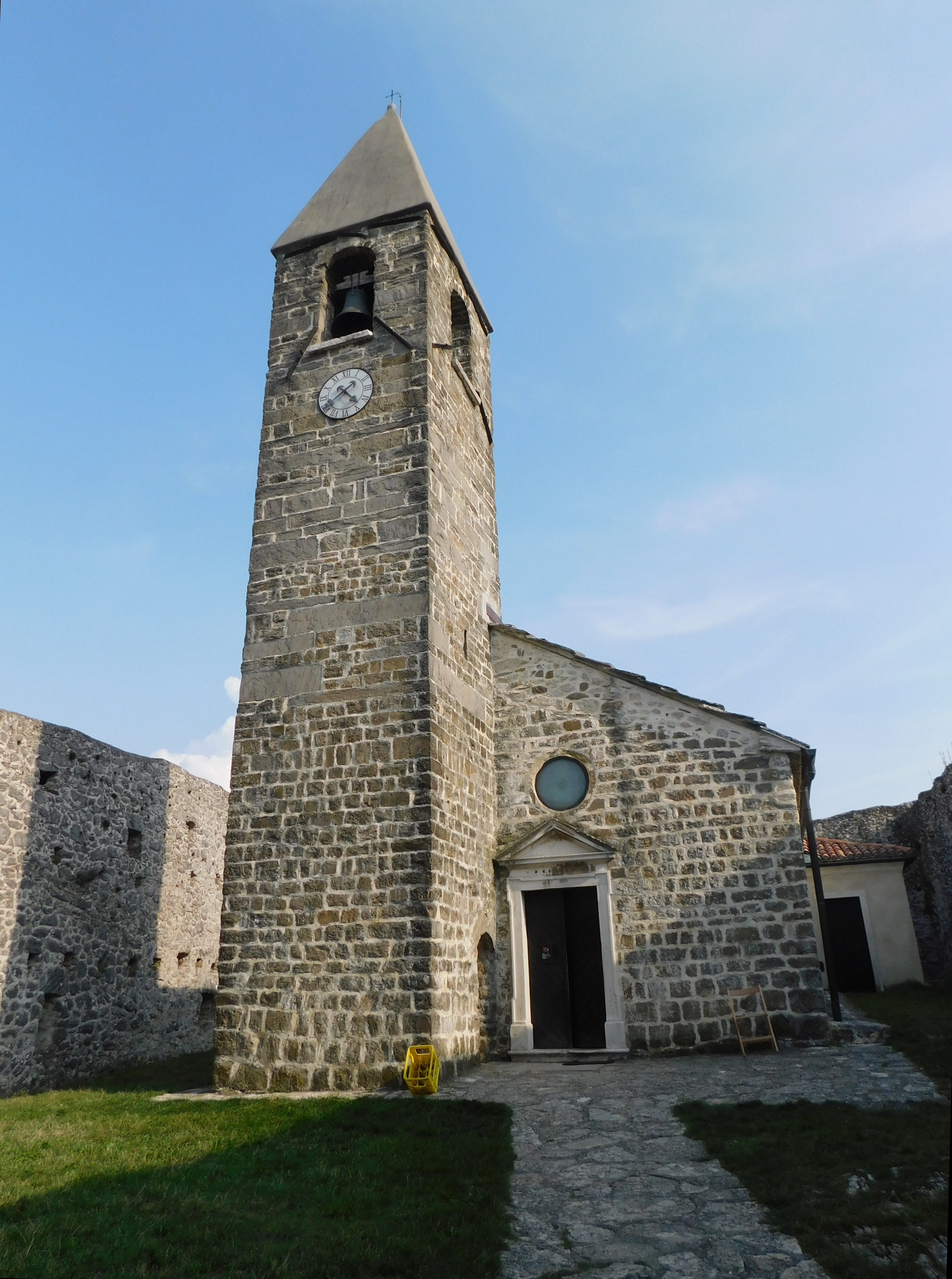 Hrastovlje